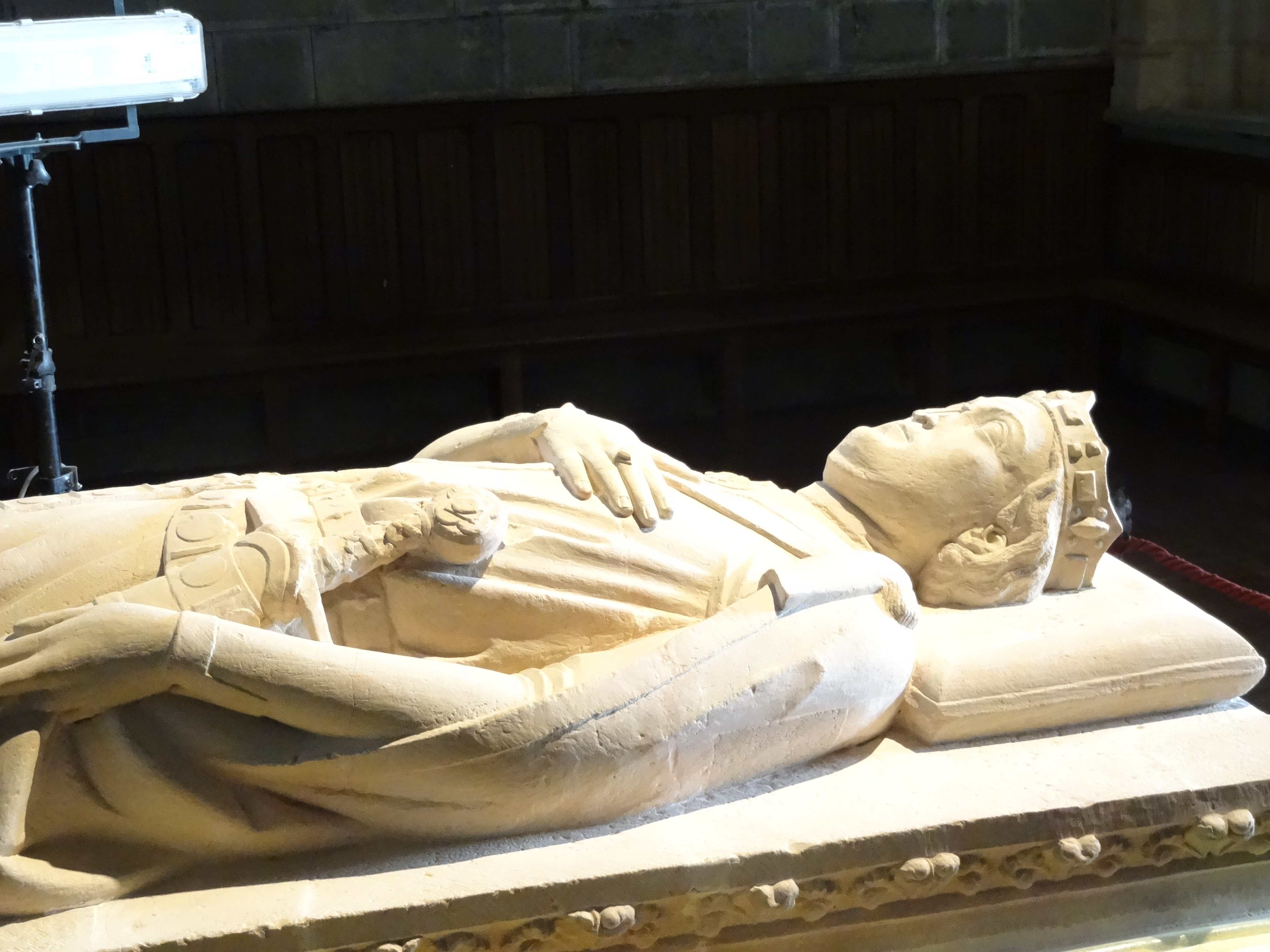 Sepulcro de Sancho VII